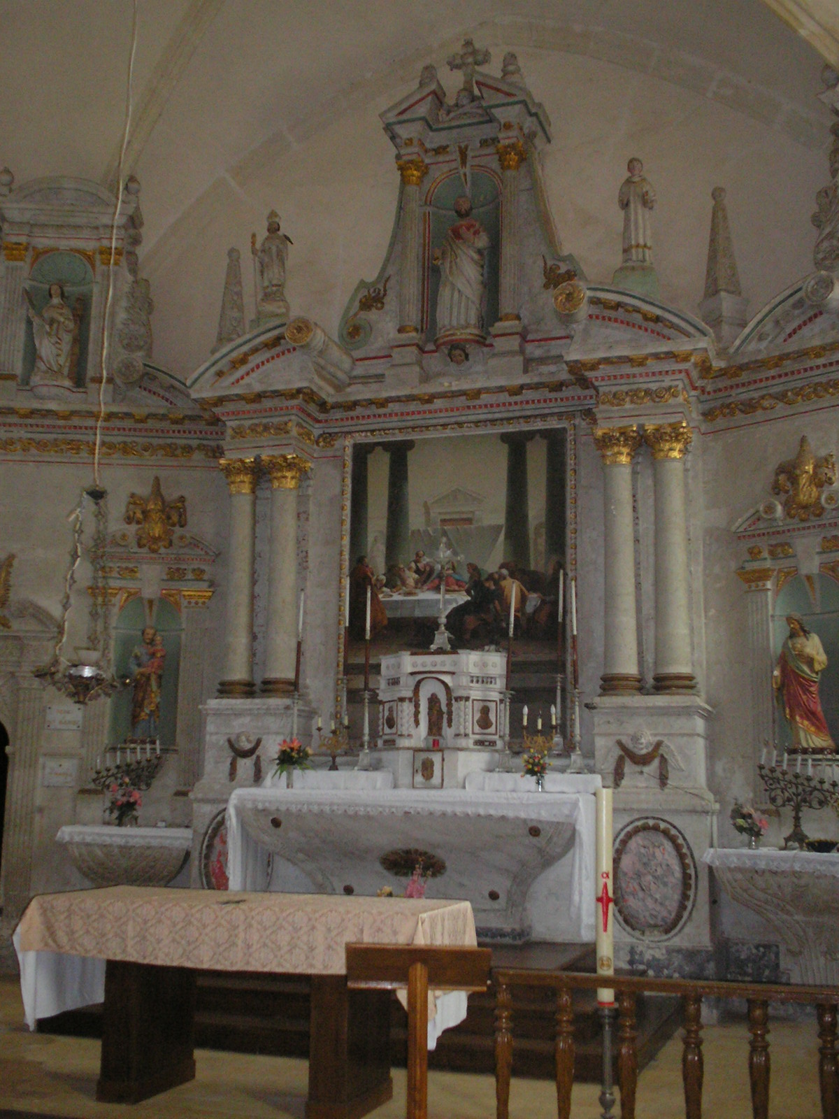 Interieur de l'église de Miermaigne